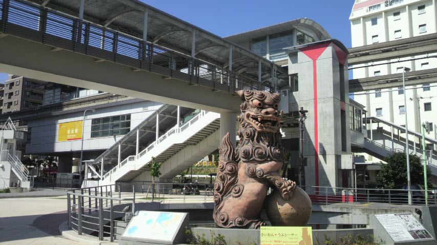 沖縄都市モノレール線牧志駅。